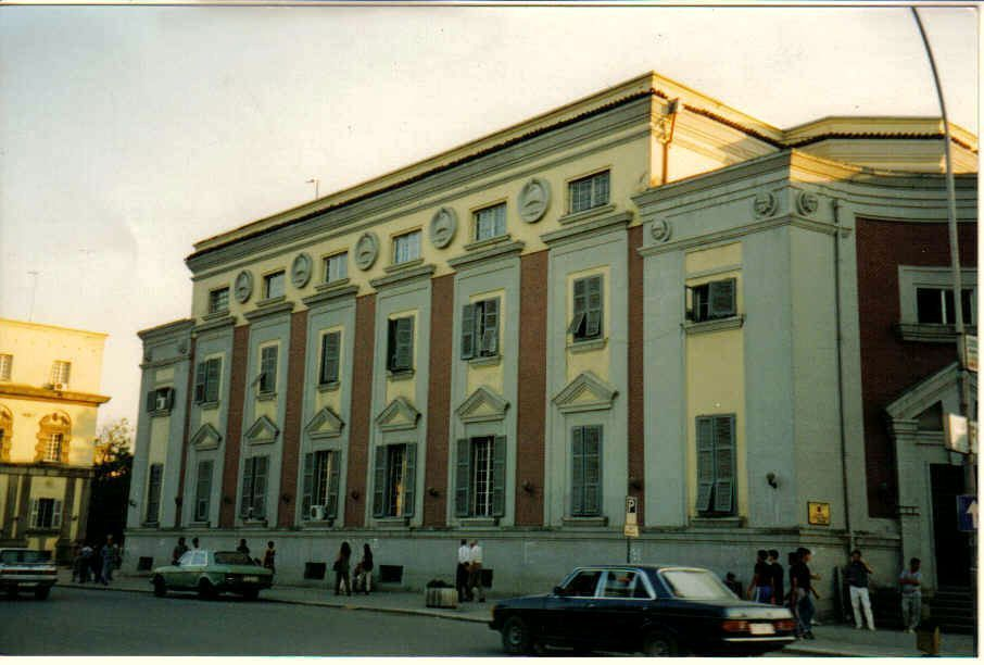 Regierungsgebäude am Bulevardi Deshmorėt e Kombit in Tirana (Albanien), errichtet 1930 Gouvernemental building at Bulevardi Deshmorėt e Kombit in Tirana (Albania), built in 1930